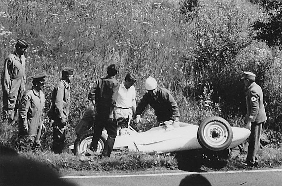 Erstes Formel-V-Rennen auf dem Nürburgring, 10 Runden auf der Start-und-Ziel-Schleife, Südkehre